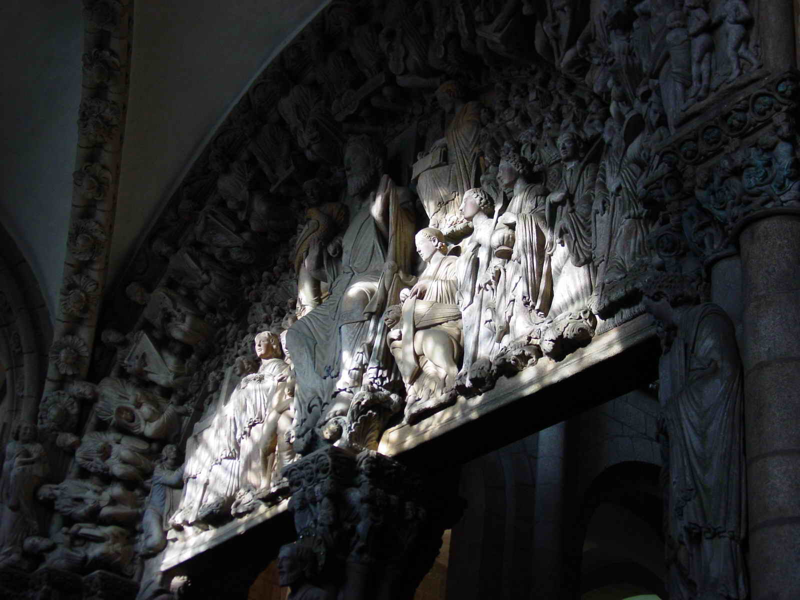 Santiago de Compostela - Galicia - España (Spain)